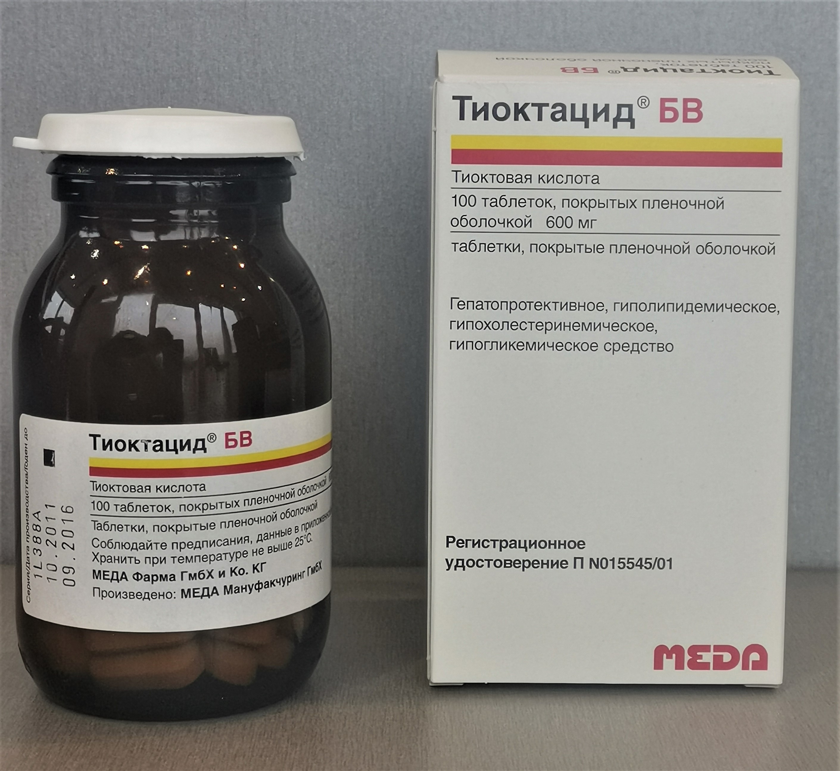 Тиоктацид® БВ